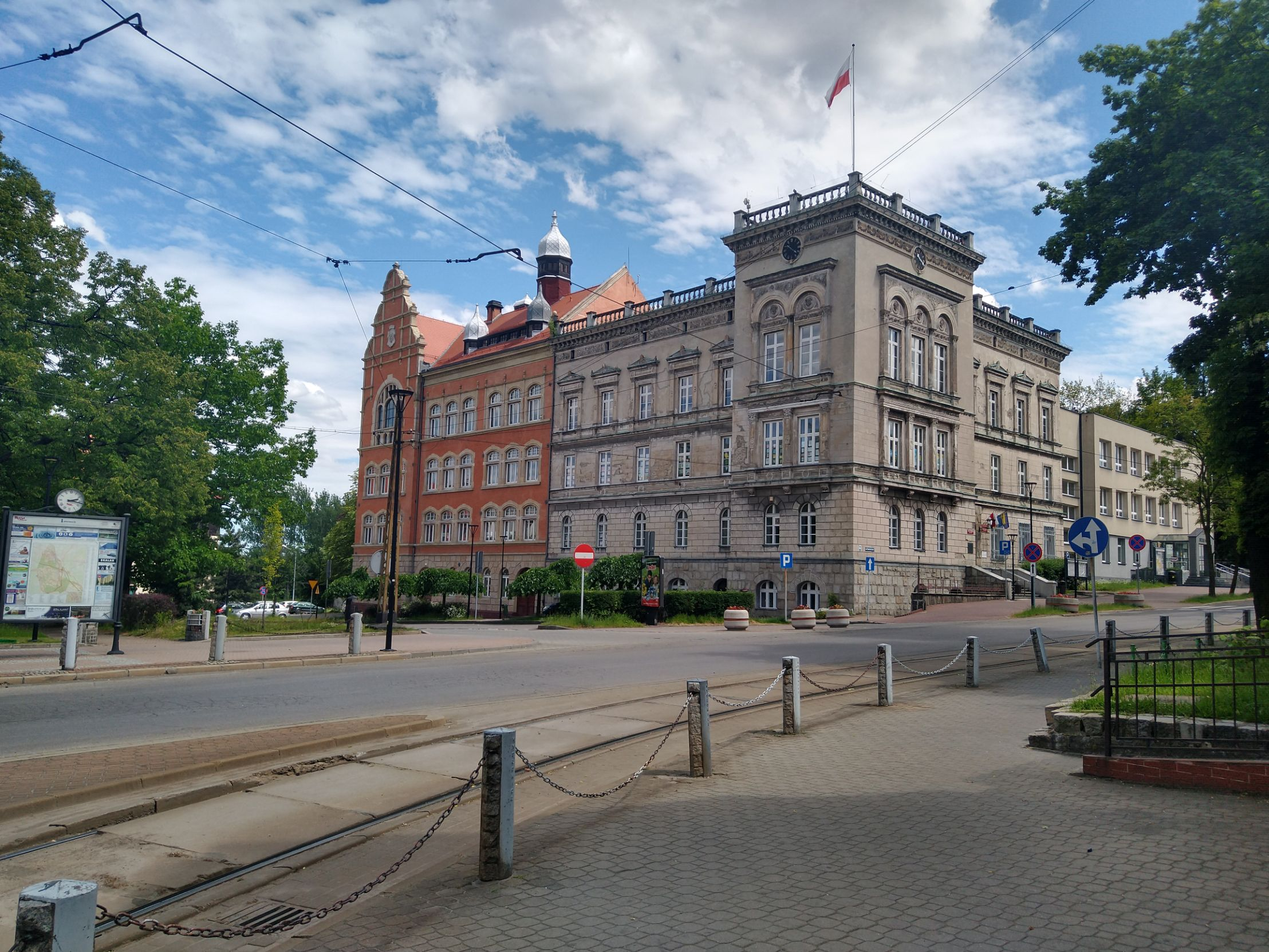 Budynek urzędu miasta w Mysłowicach